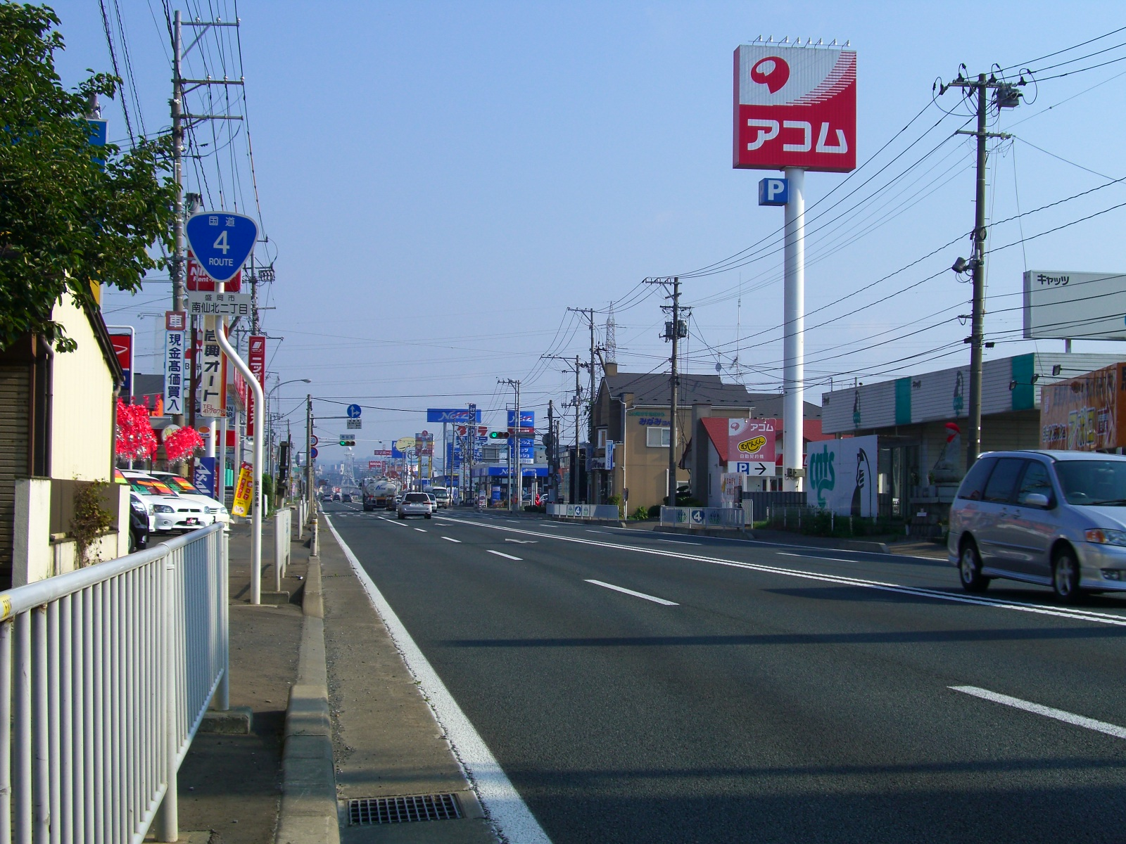 盛岡市内